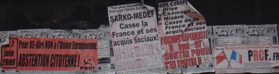 Affiches anti-électorales du Pôle de renaissance communiste en France en 2009 à Lille